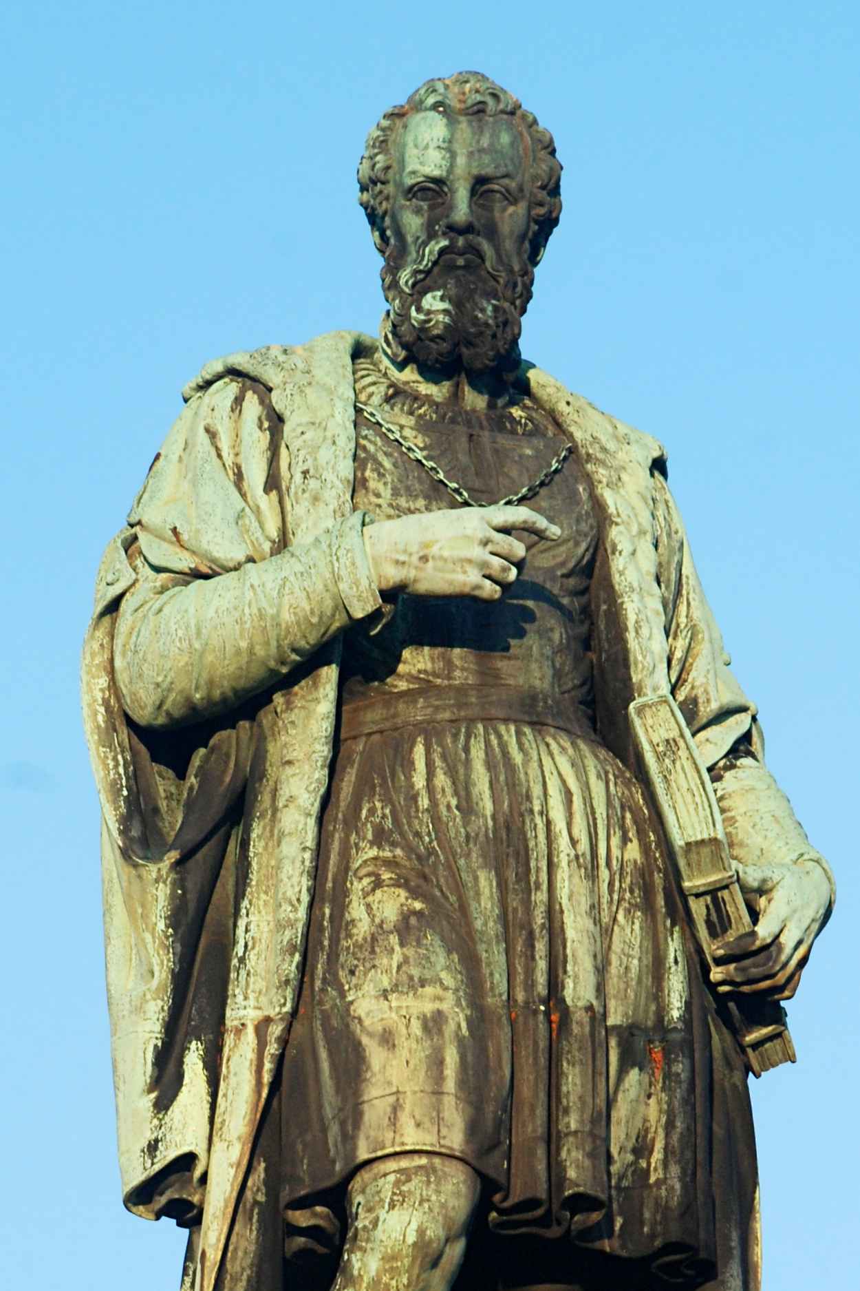 Belgique - Bruxelles - Place des Barricades - Statue d'André Vésale (Joseph Geefs, 1846)